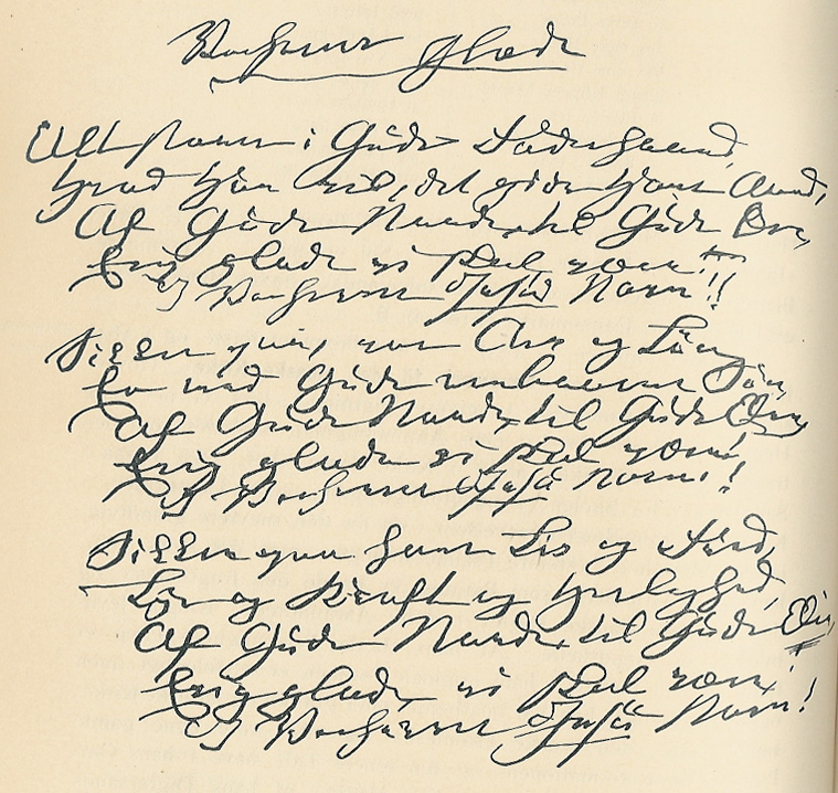 Nikolaj Frederik Severin Grundtivgs håndskrift.